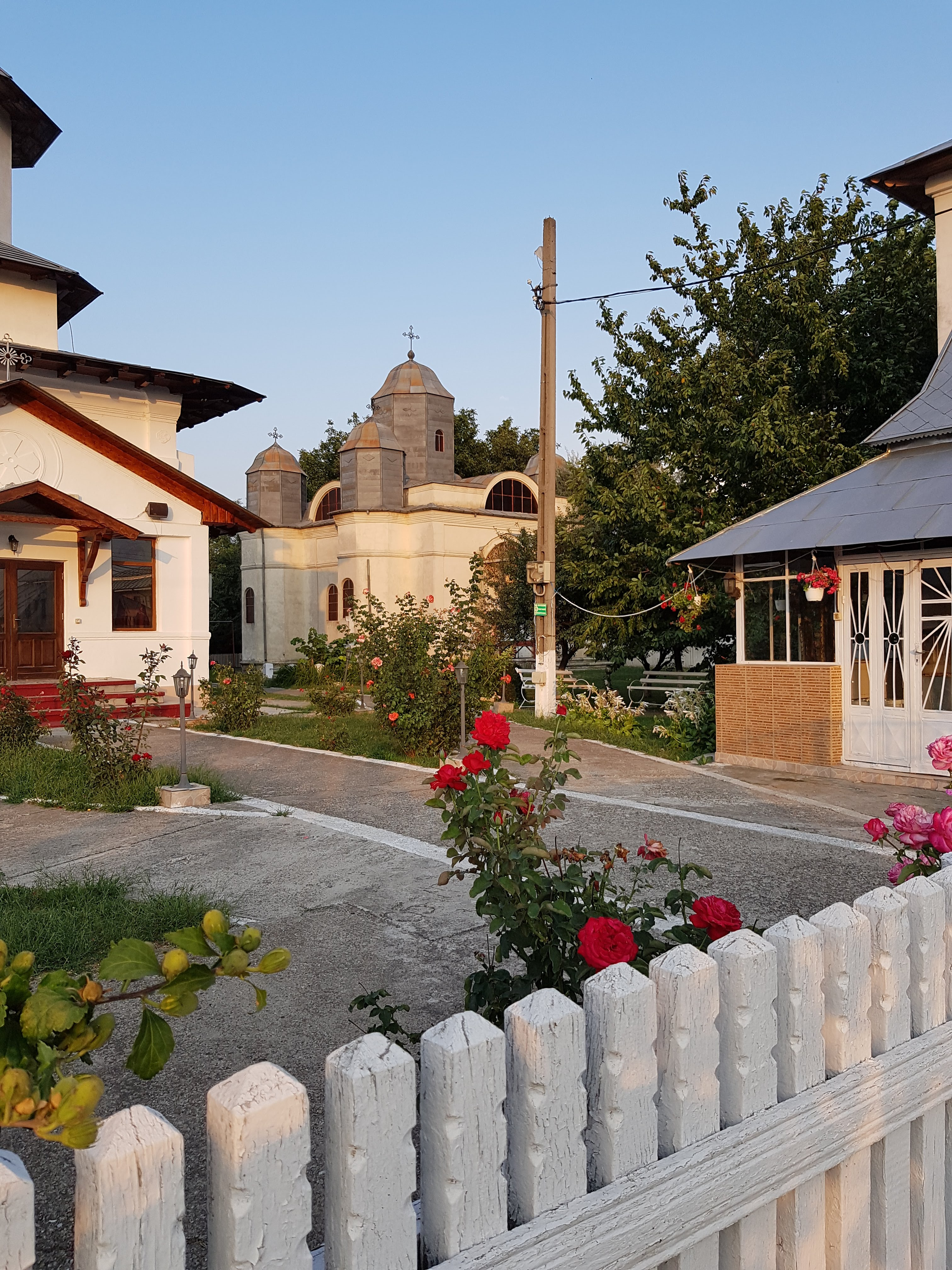 Biserica „Sf. Ecaterina”